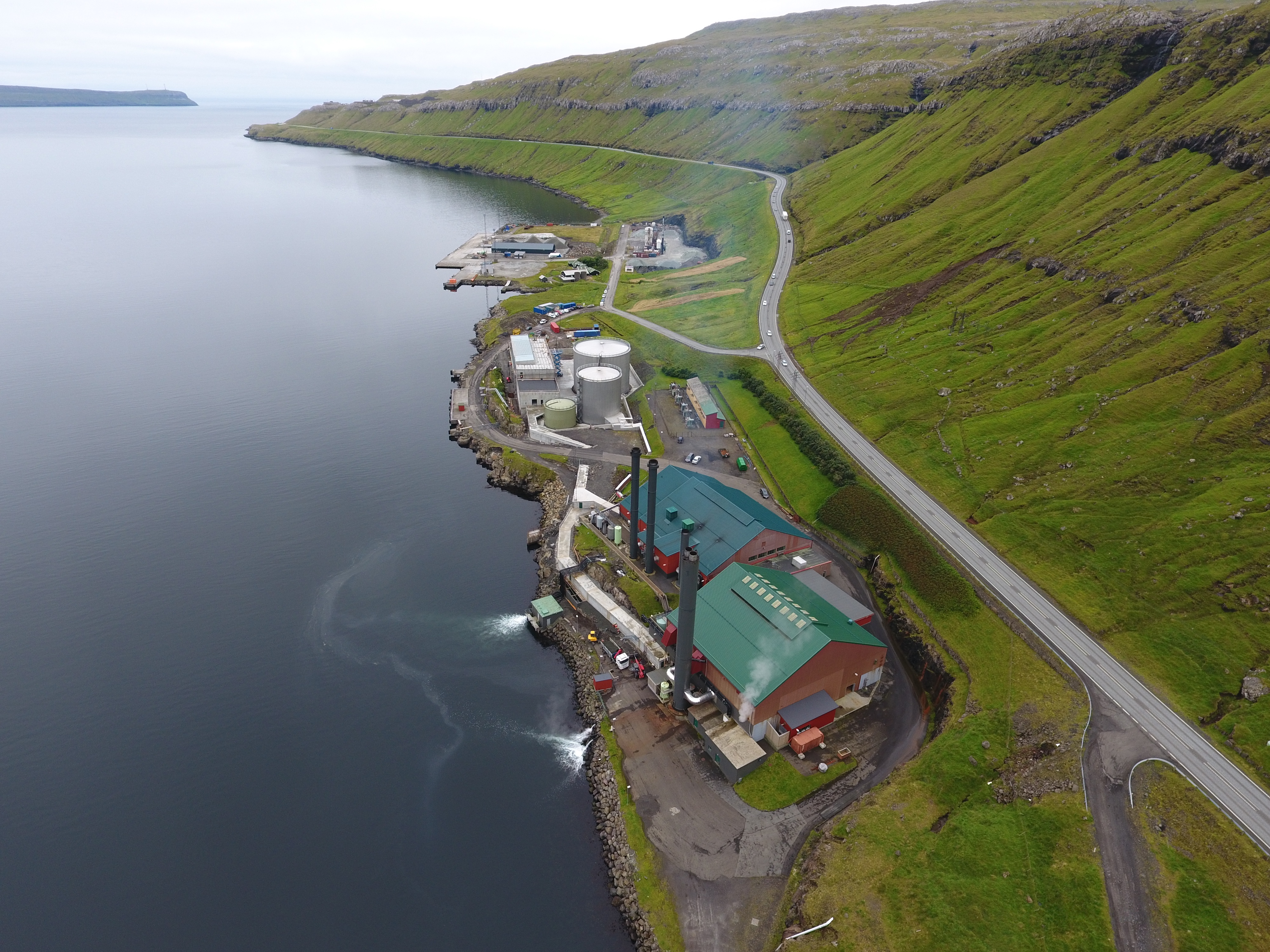 Diesel-elektrisk kraftværk og havn.